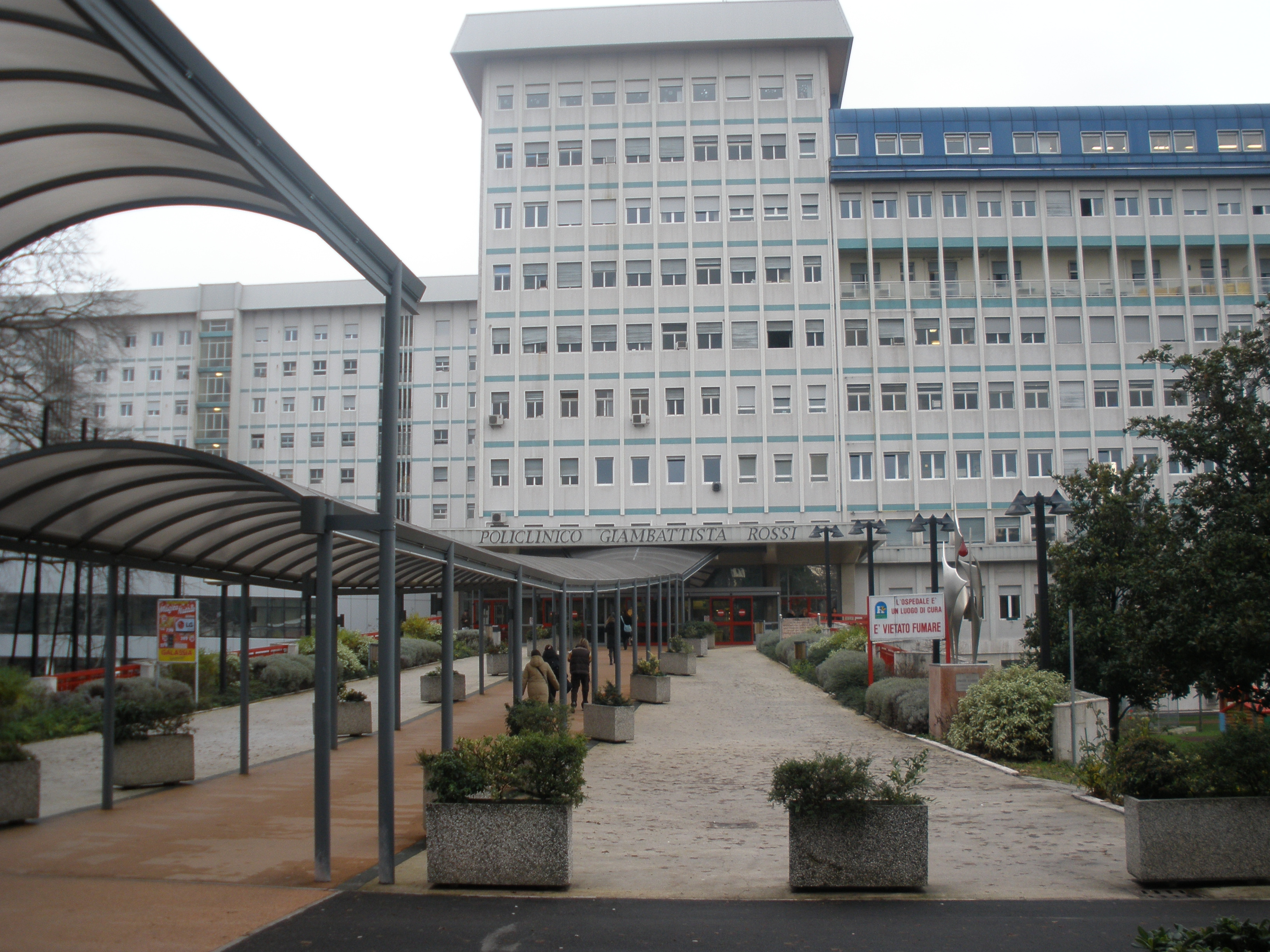 entrata dell'ospedale che si trova nel quartiere Borgo Roma, il policlinico "Giambattista Rossi"